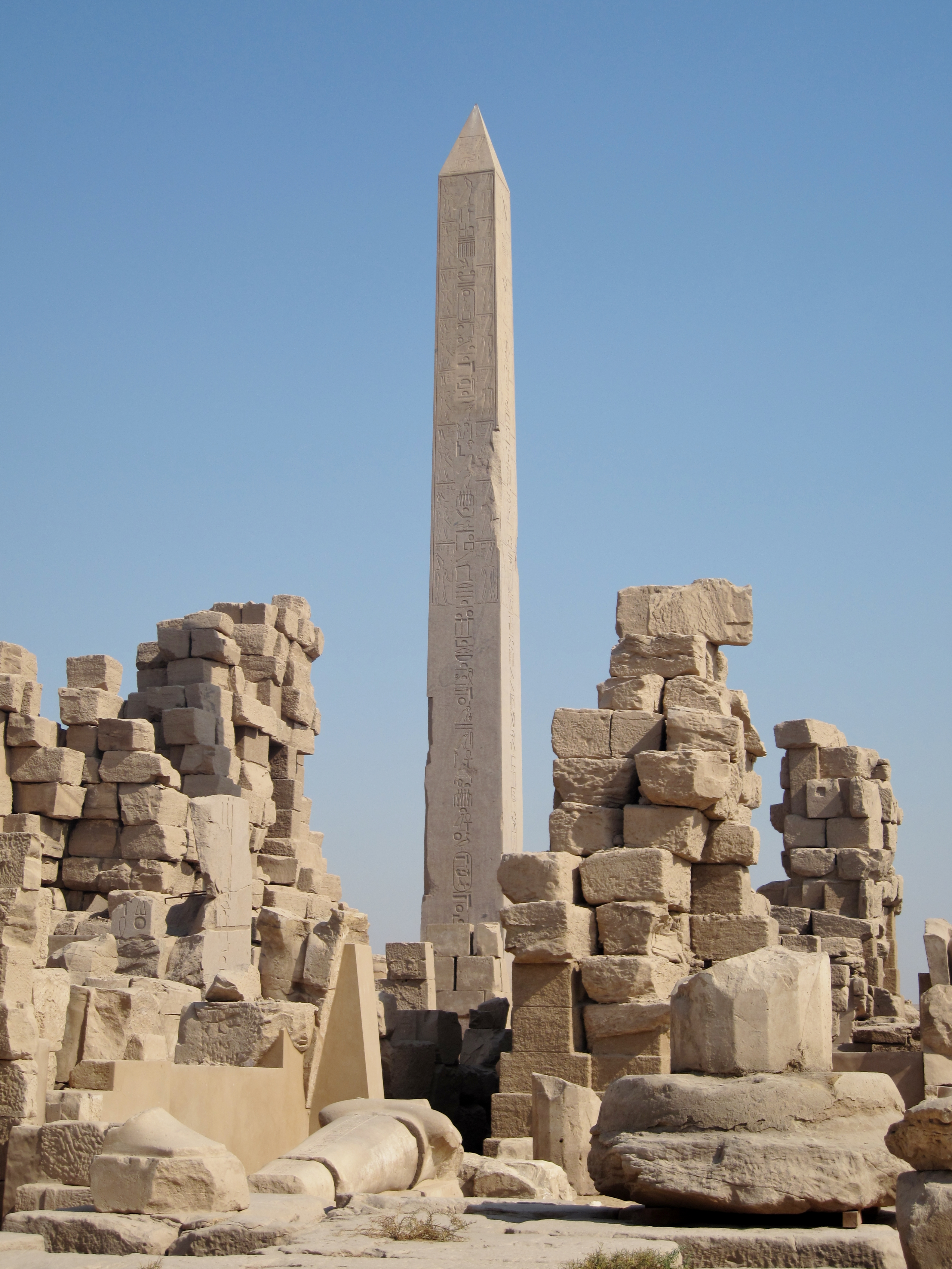 Obelisk der Hatschepsut im Tempel von Karnak, nördlich von Luxor, Ägypten